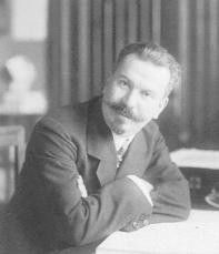 Сергeй Никbфорович Василtнко (1872—1956) — русский и советский композитор, дирижёр и педагог, народный артист РСФСР, народный артист Узбекской ССР, лауреат Сталинской премии первой степени.